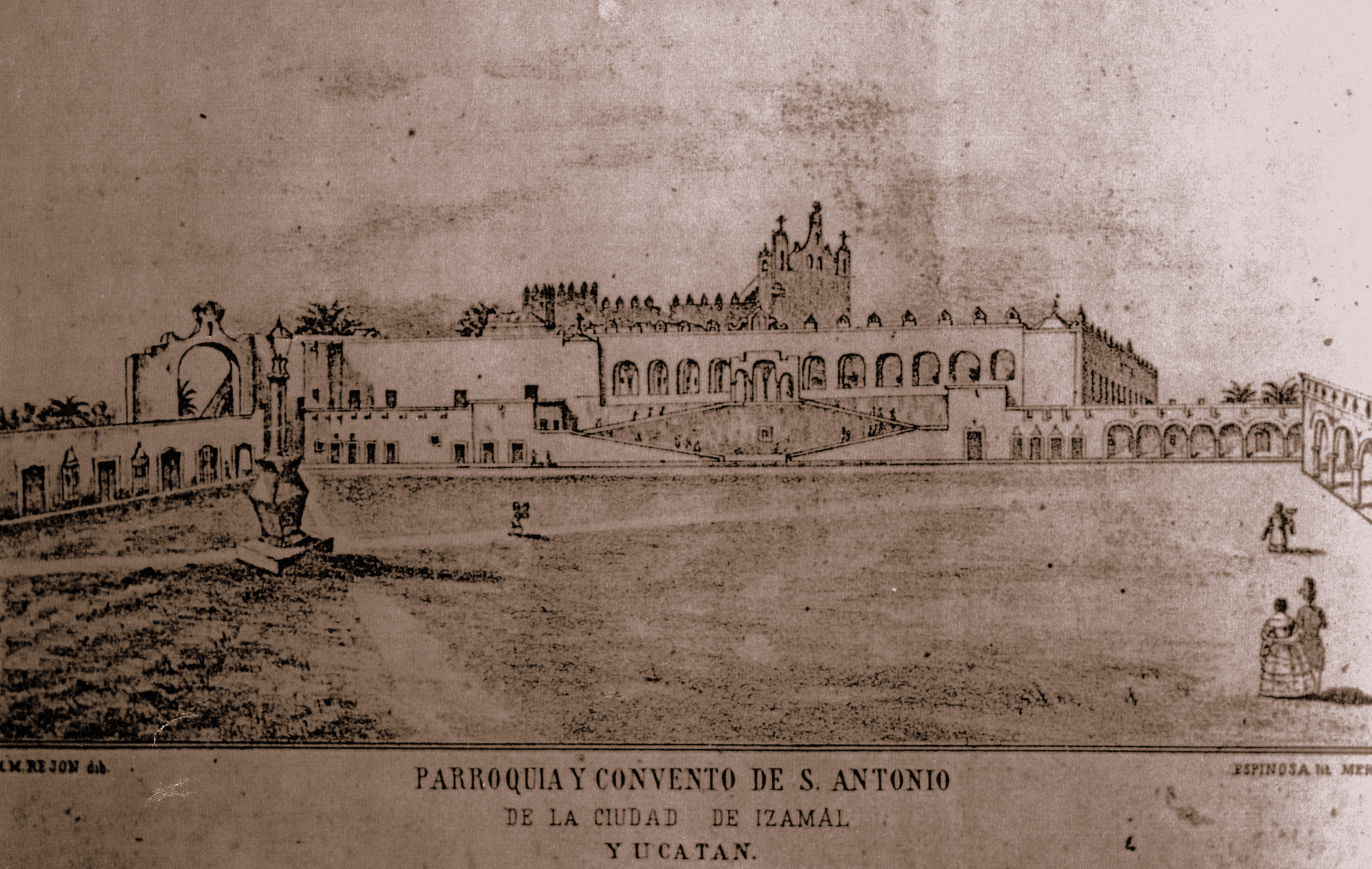 Litografía de imagen del Convento de Izamal, Yucatán, México, en el siglo XIX. Color sepia.